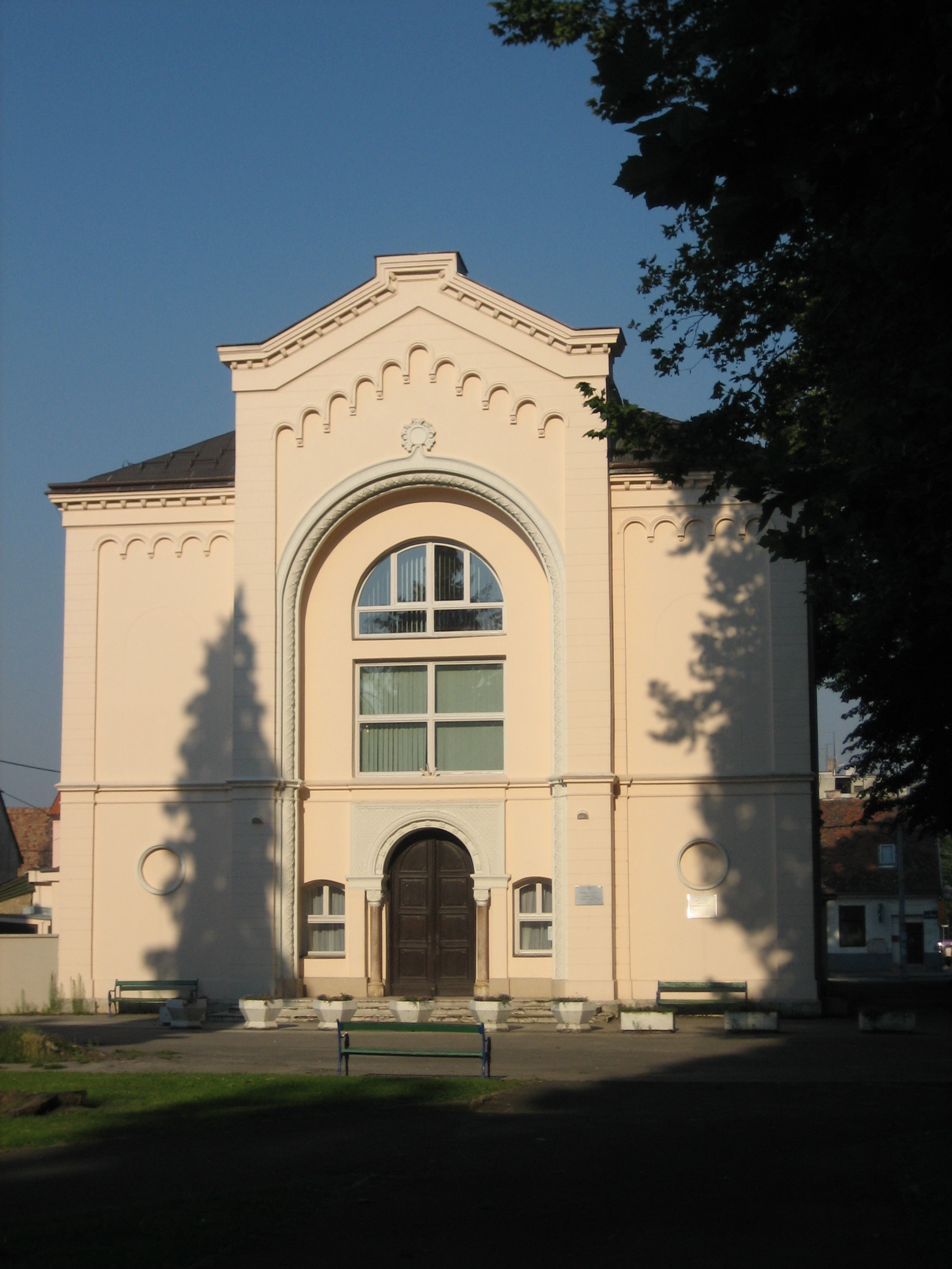 Once sinagogue, now music school "Fran Lhotka" in Sisak, Croatia. / Nekadašnja sinagoga, a danas glazbena škola „Fran Lhotka“ u Sisku.